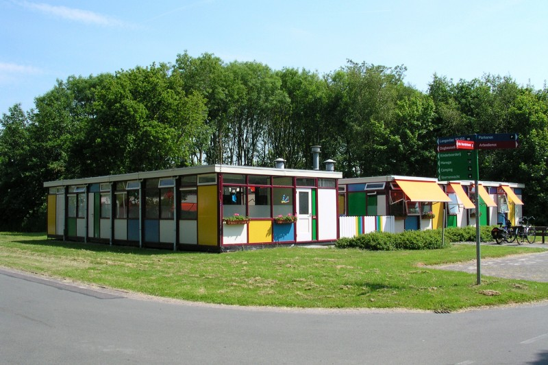 Eén van gebouwen van 's Heeren Loo Zorggroep in Noorderhaven. One of the buildings of 's Heeren Loo Zorggroep in Noorderhaven.